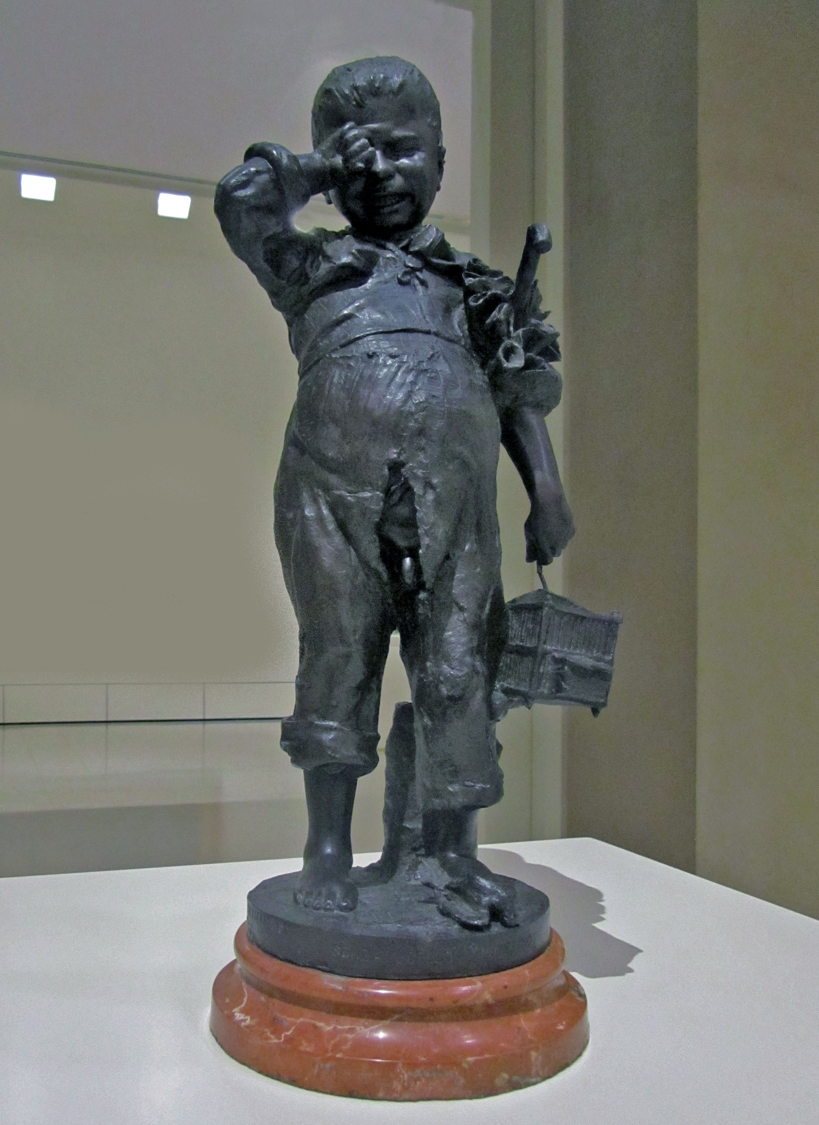 Escultura de Torquat Tasso titulada Senza ucello, poverino ! de l'any 1891. Conservada al Museu Nacional d'Art de Catalunya. Barcelona